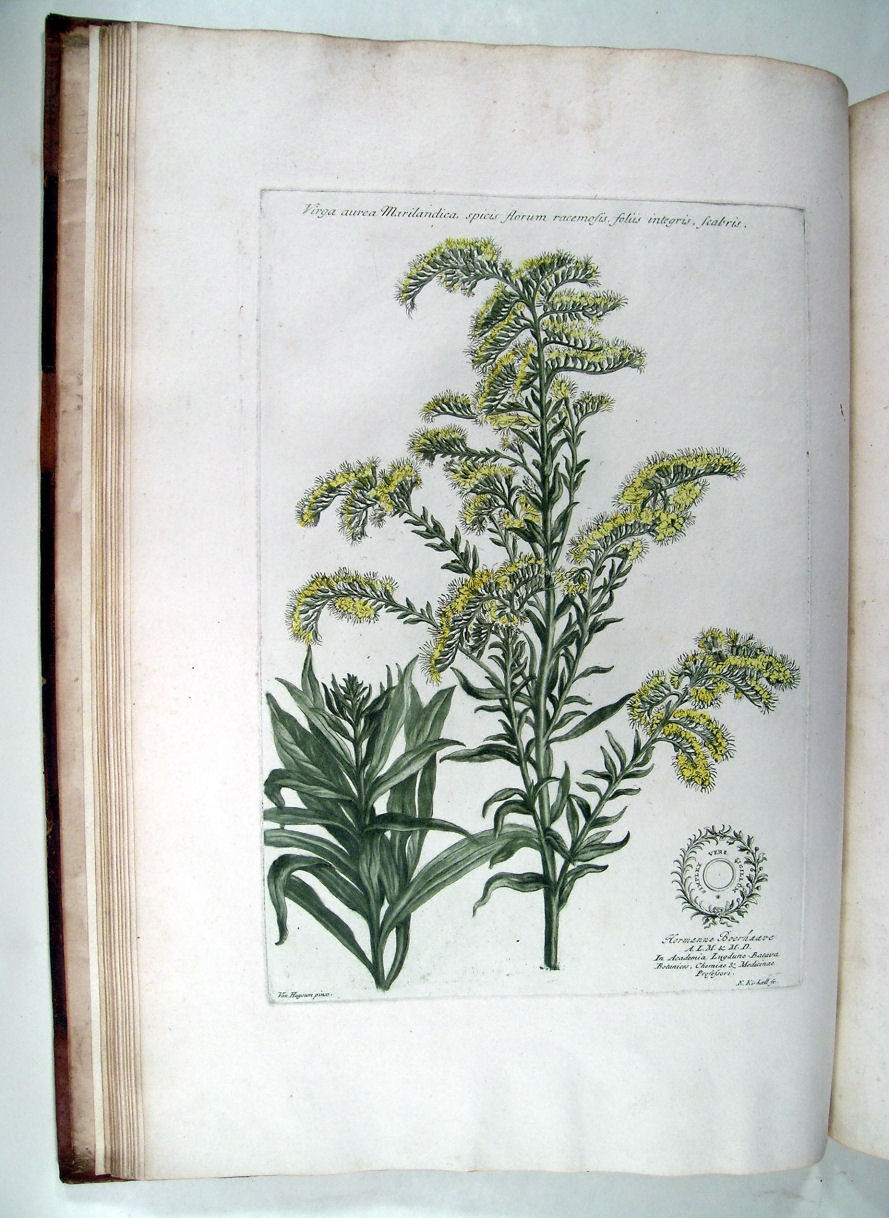 It looks more like Solidago canadensis